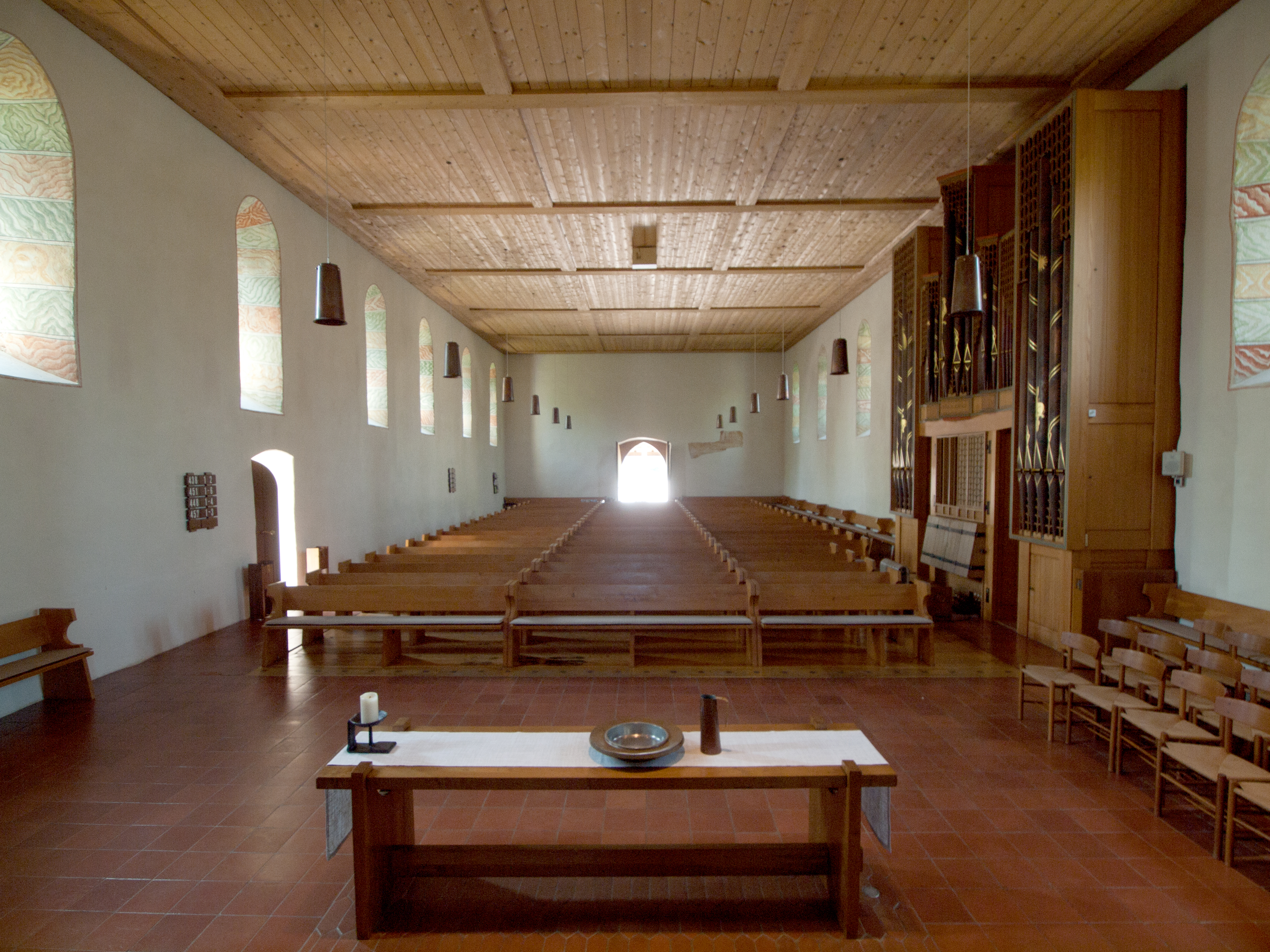 Die Reformierte Kirche von Windisch (gebaut um 1300) Sicht vom Chor ins Schiff